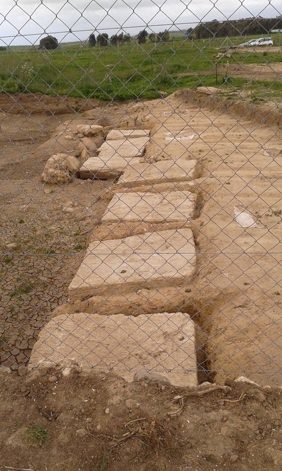 Necropoli di Monte Prama durante gli scavi 2014